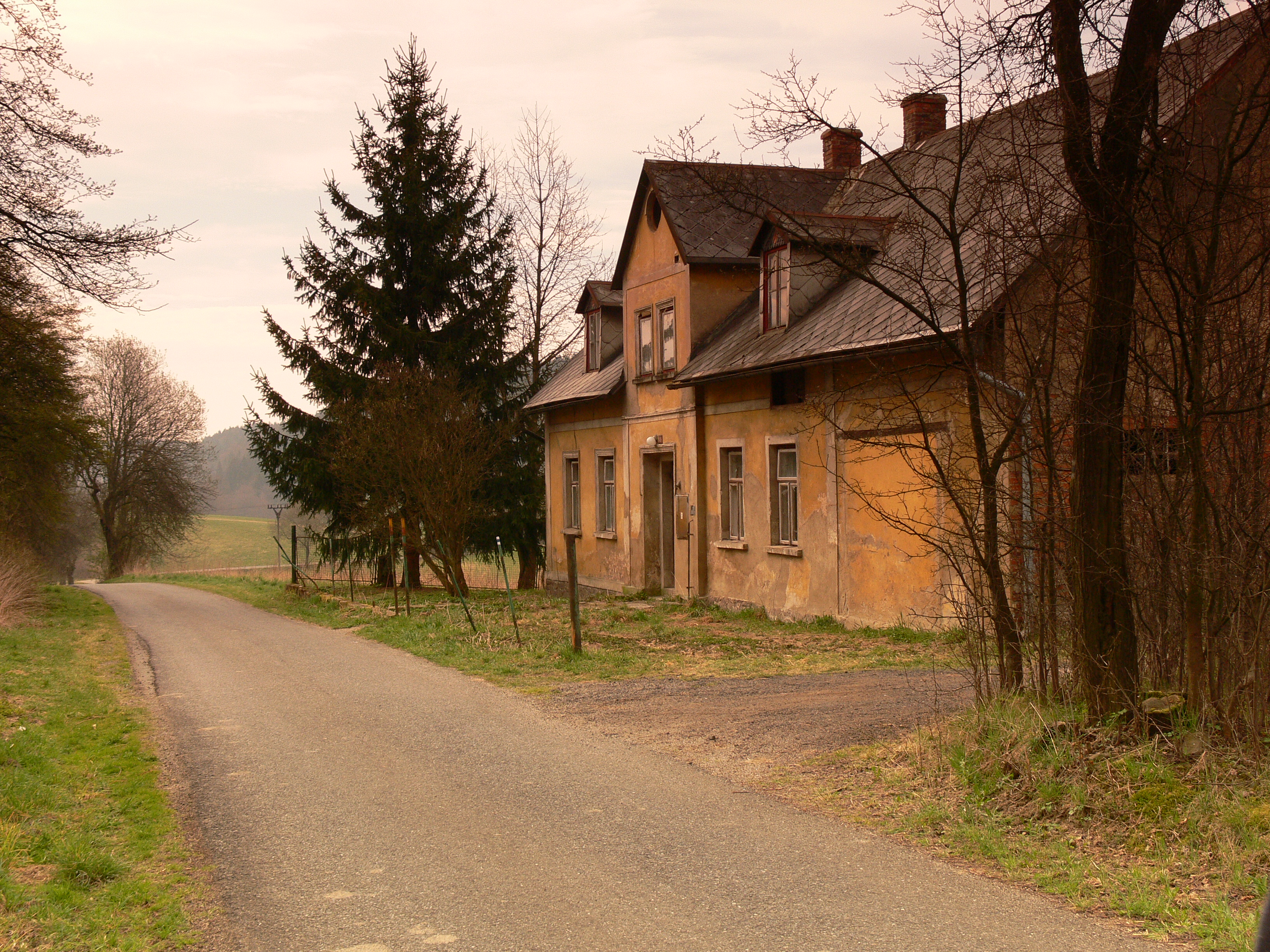 Hodkovice nad Mohelkou, Czech Republic